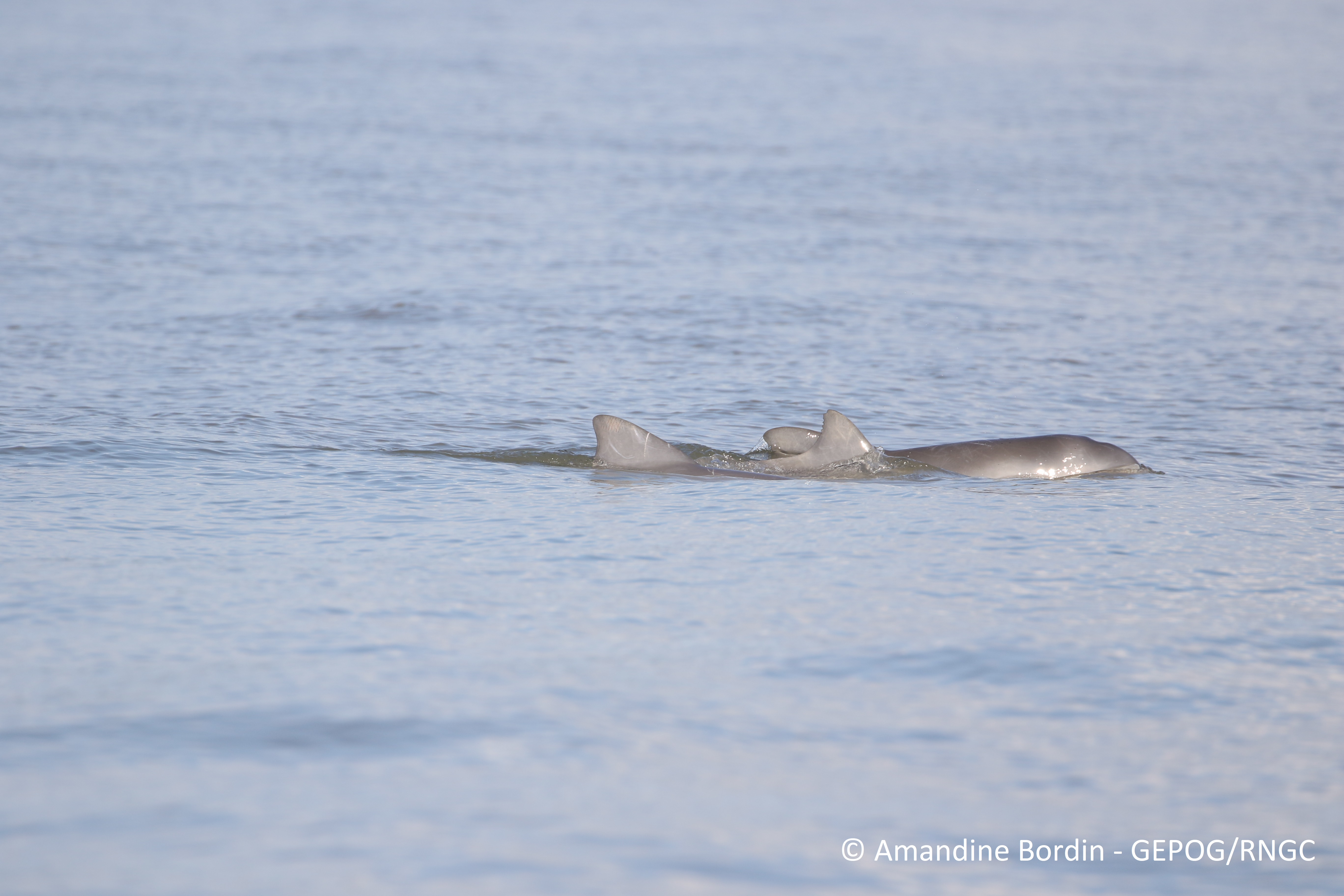 Comportement discret